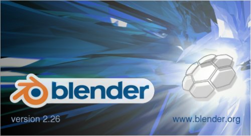 Blender 2.26 Splash Blender Foundation - Blender